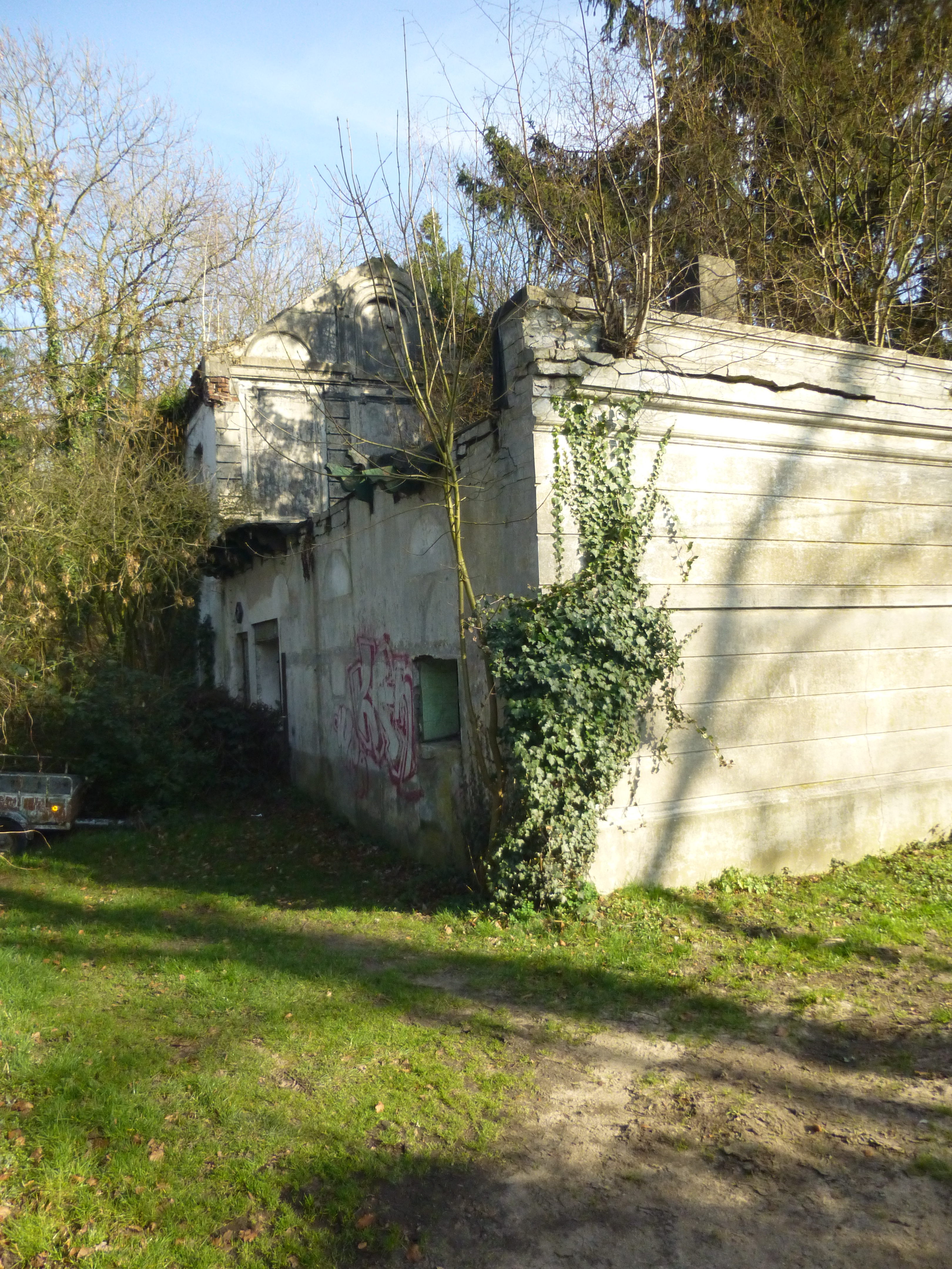 ehemaliges linkes Wirtschaftsgebäude des Rittergutes